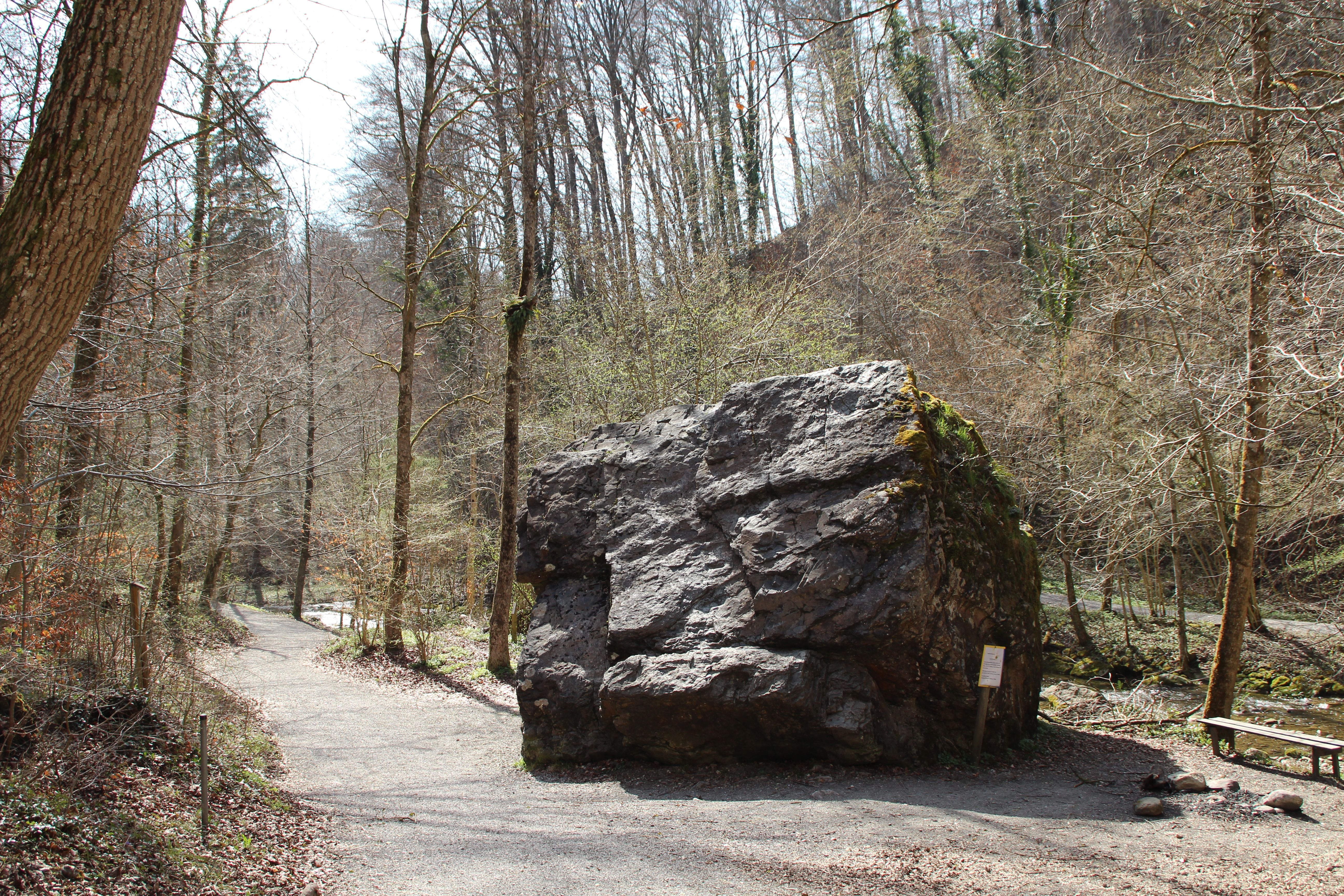 Küsnachter Dorfbach Alexanderstein